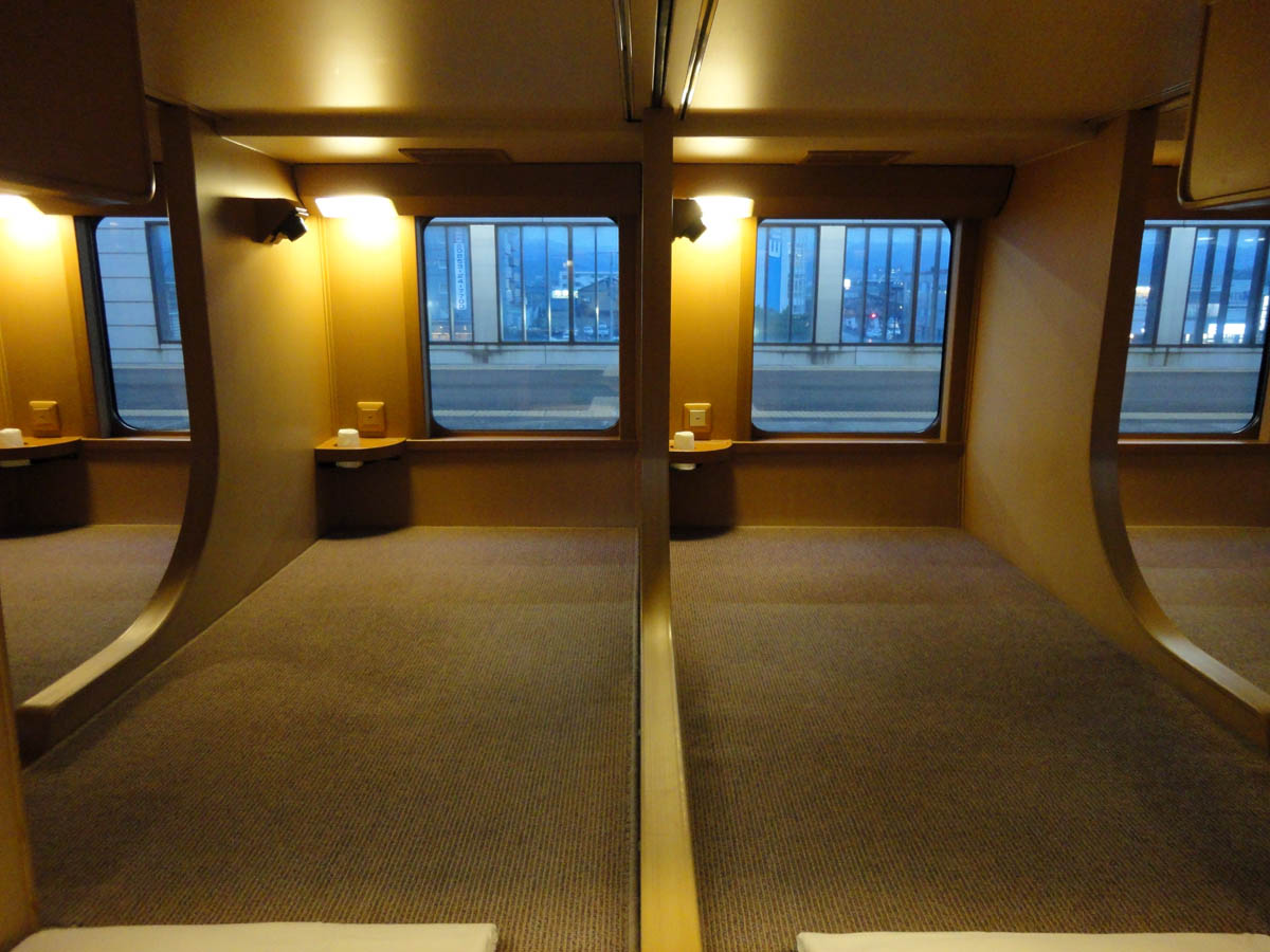 JR西日本285系 普通車指定席 ノビノビ座席（下段）